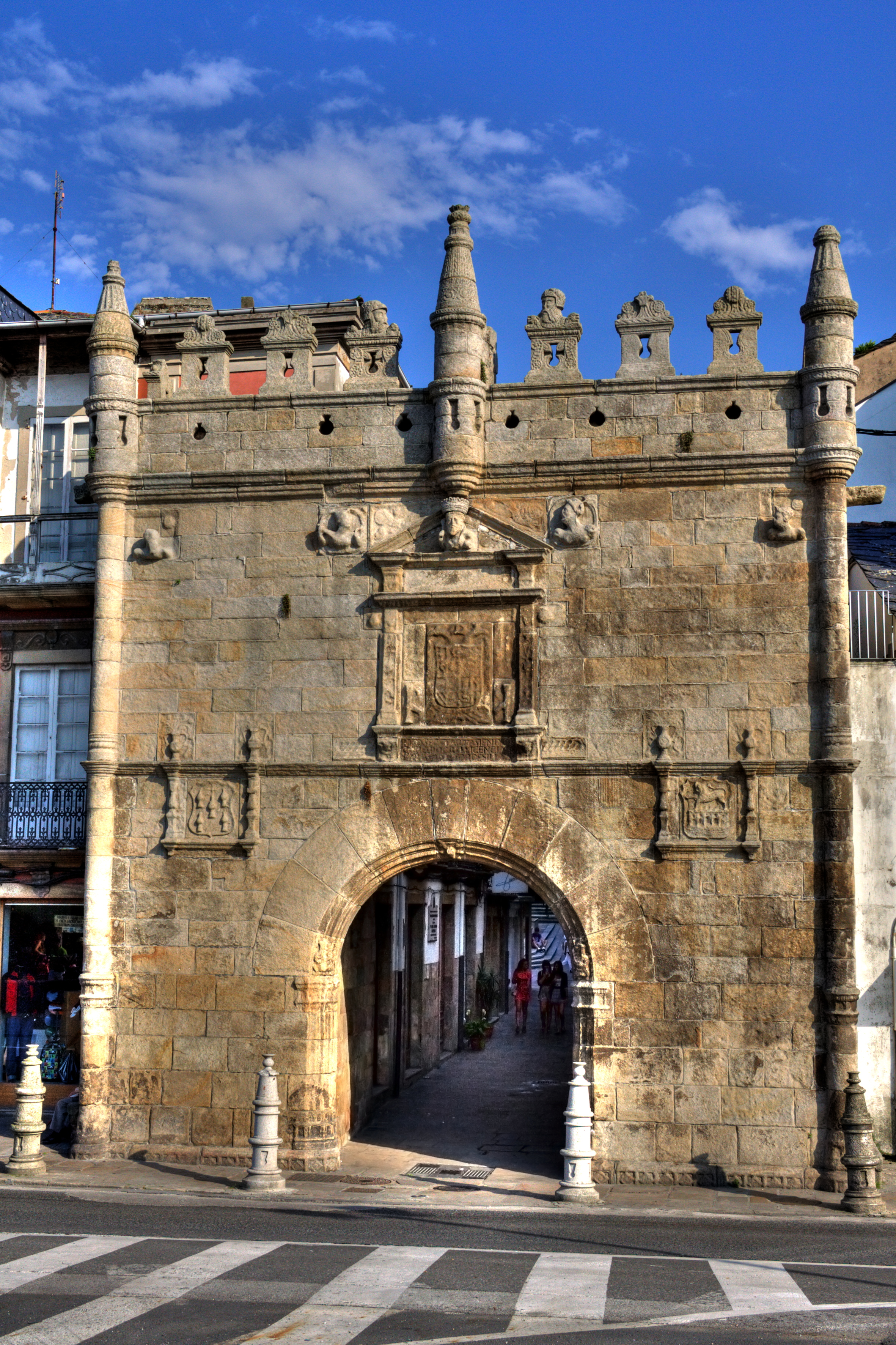 Viveiro, Puerta de Carlos V - Castillo del PuenteGalego: Viveiro, Porta de Carlos V - Castelo da Ponte